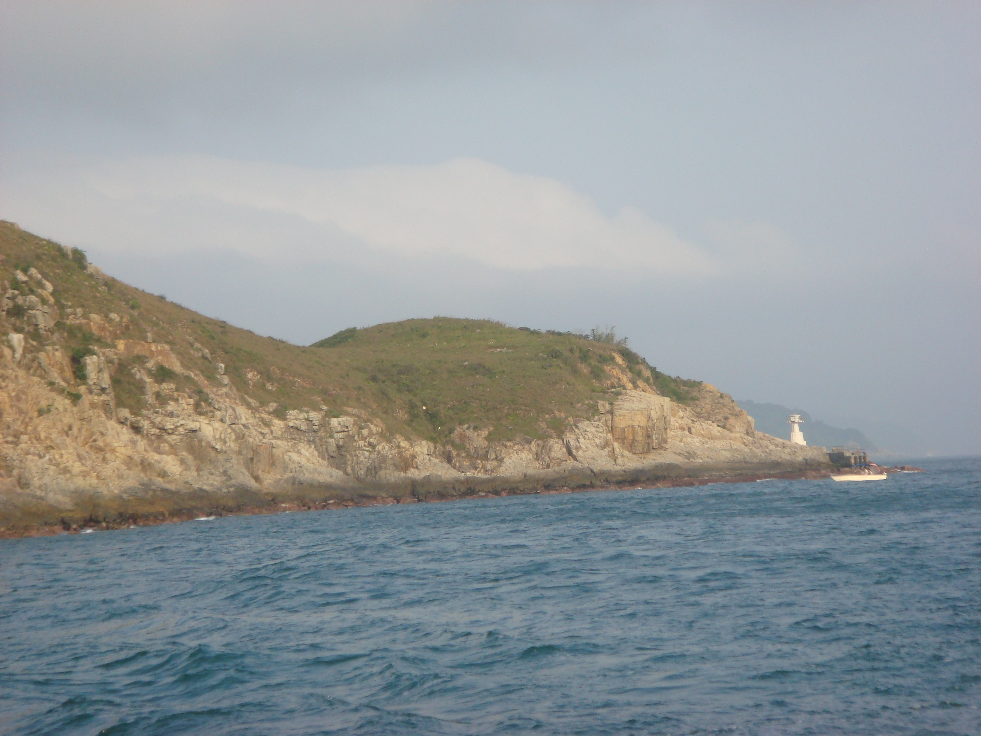 Ap Lei Pai, Hong Kong